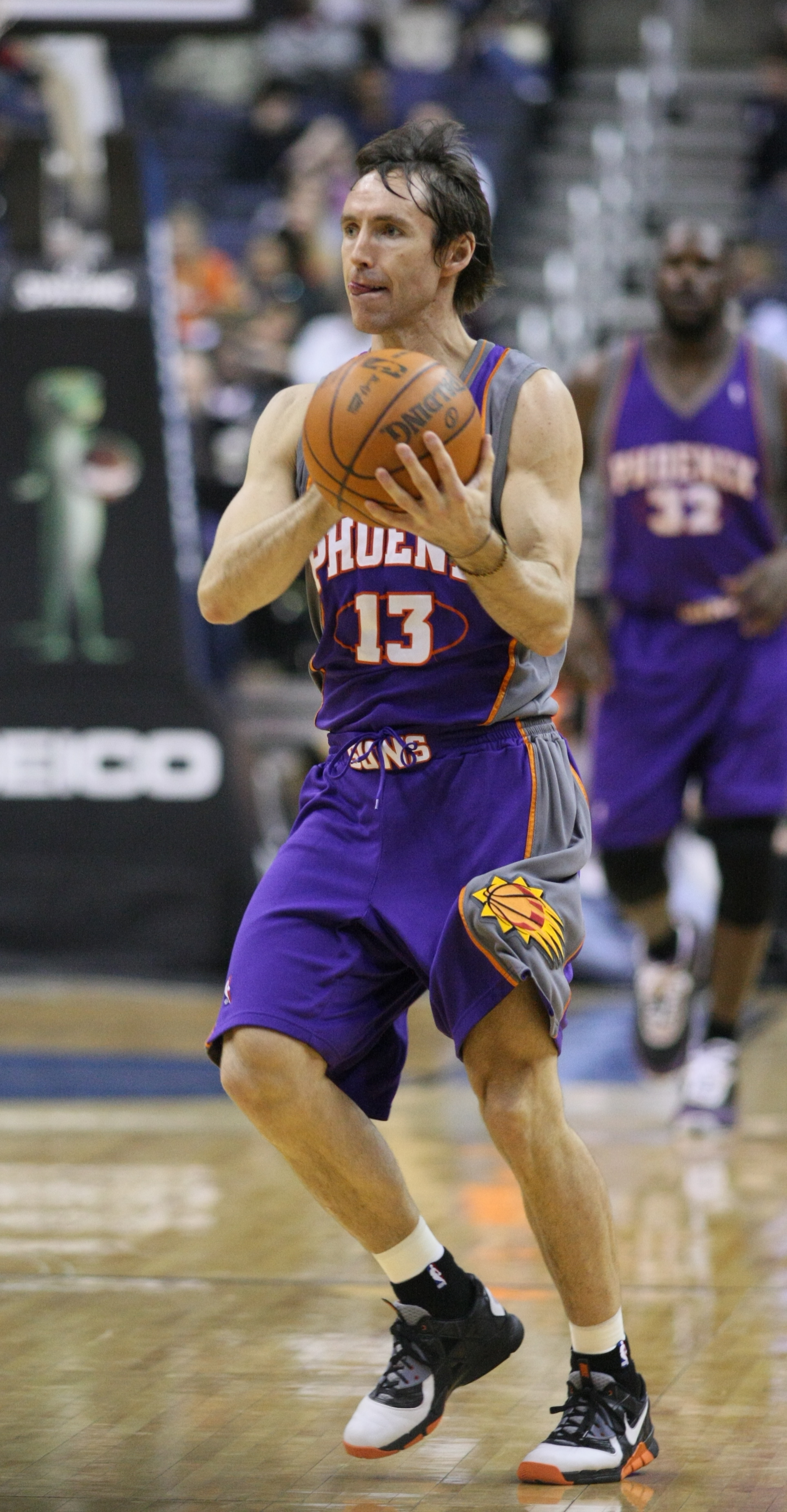 El jugador canadiense de baloncesto Steve Nash.